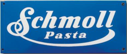 Werbetafel mit Logo von Schmoll-Schuhpasta